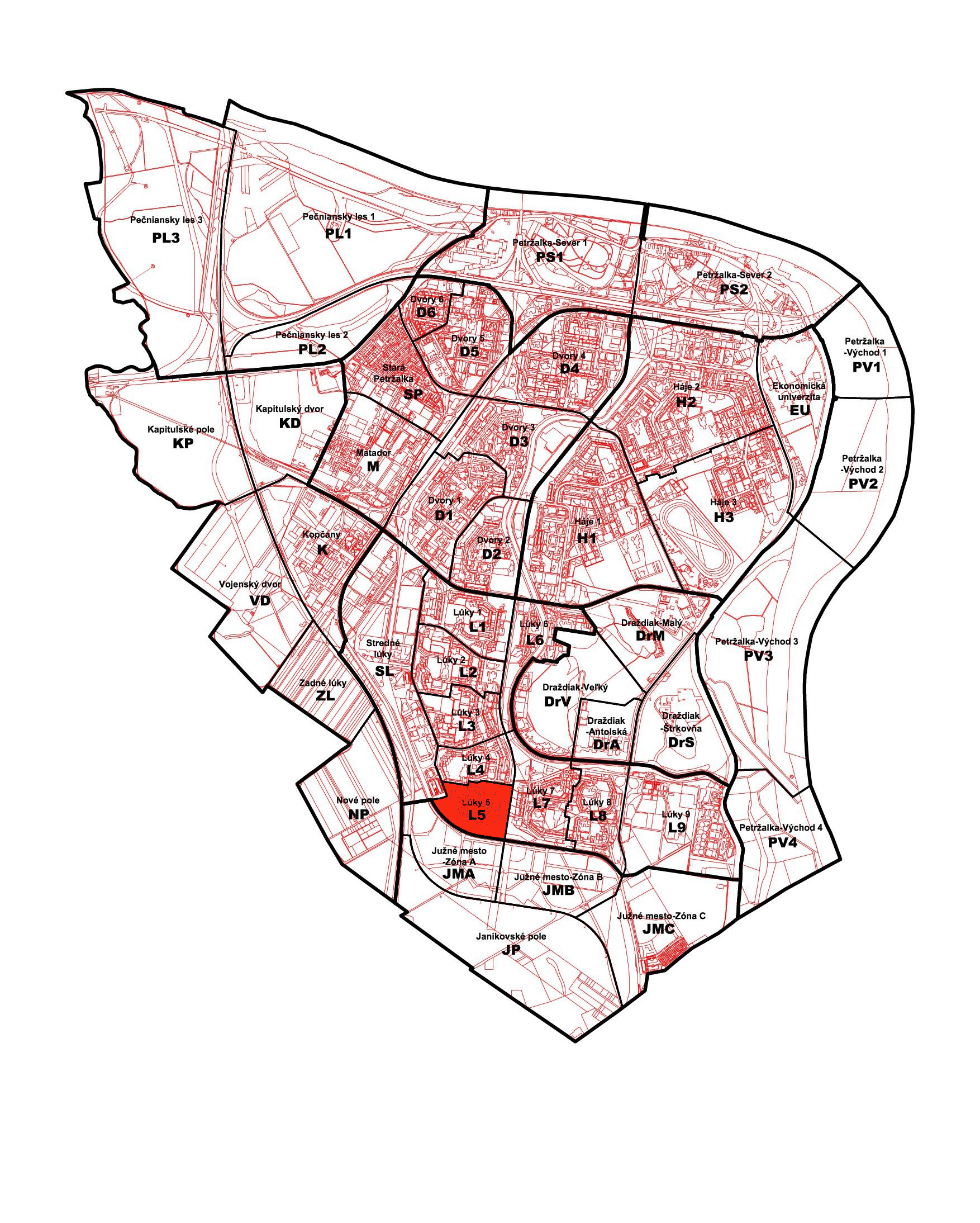 Poloha petržalskej miestnej časti